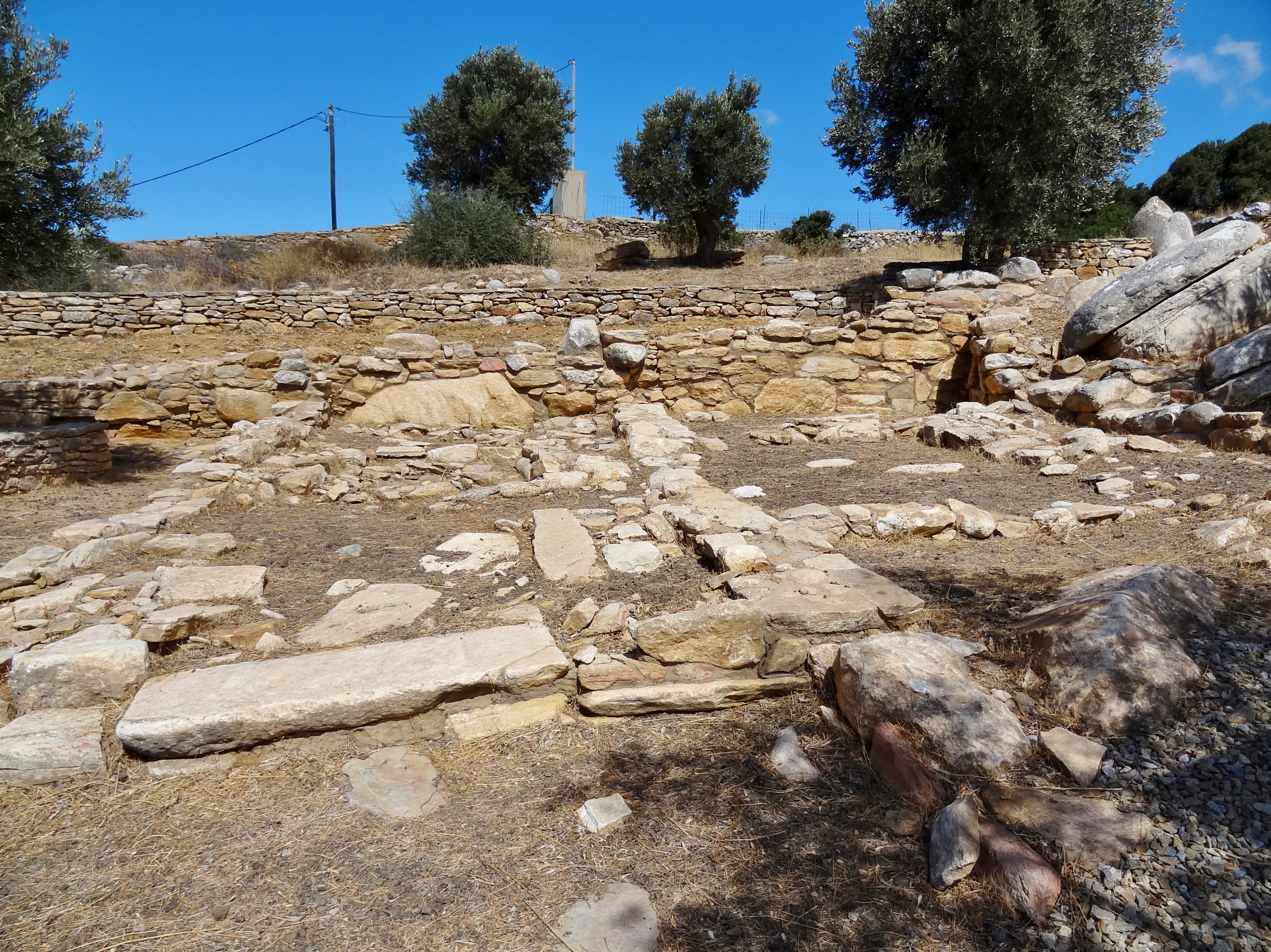 Heiligtum von Flerio auf Naxos, Kykladen, Griechenland